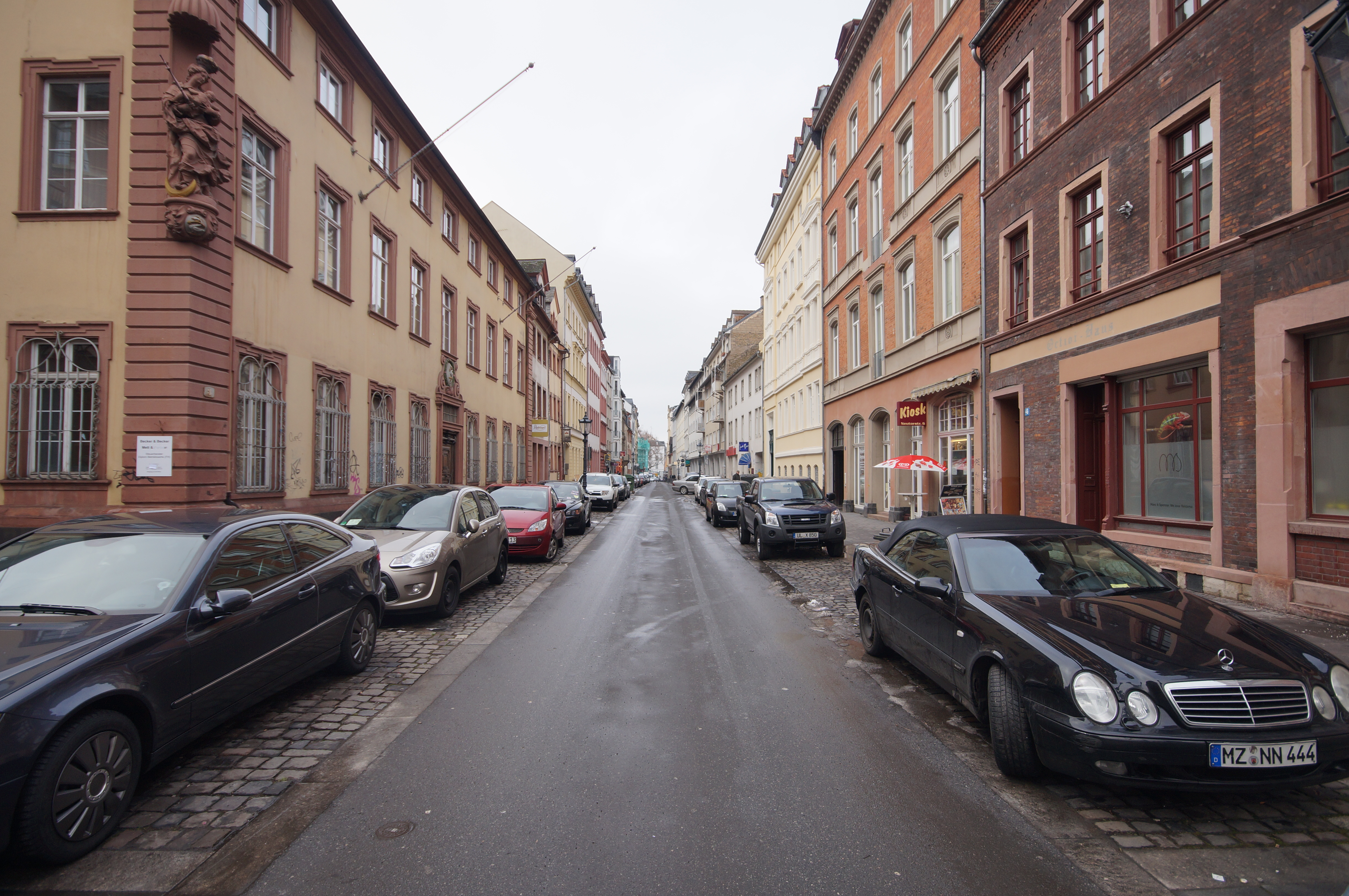 Die Neutorstraße in Mainz-Altstadt von der Kreuzung der Dagobertstraße zur Holzstraße blickend.